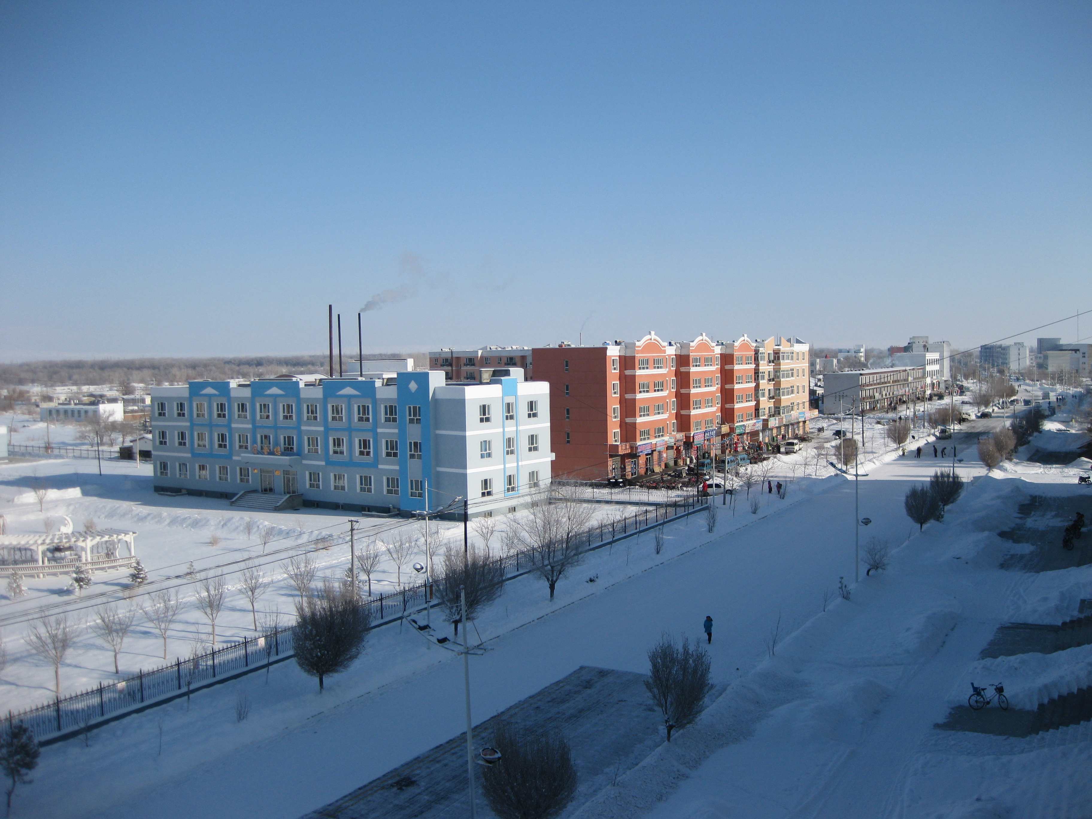 冬天的181团主街道